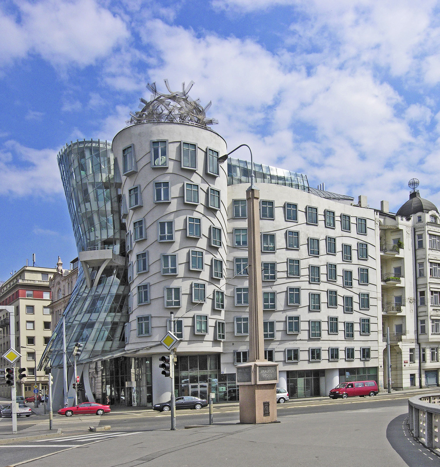 Tančící dům v Praze od architekta Franka Gehryho